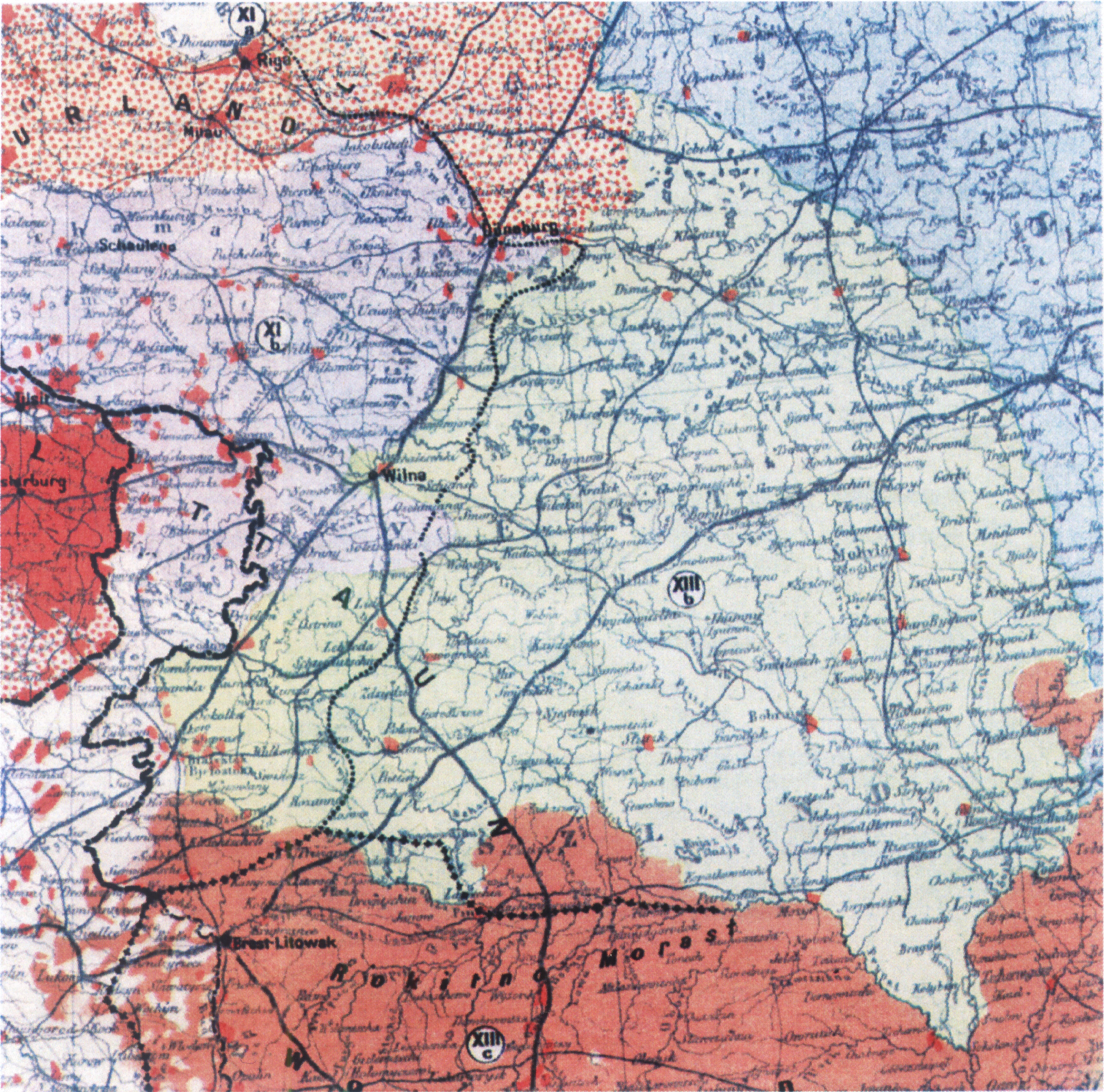 Ziemie i ludy Europy, 1918